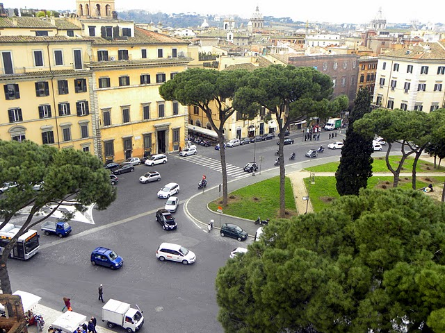 Roma